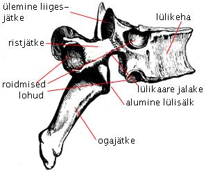 Rinnalüli pilt